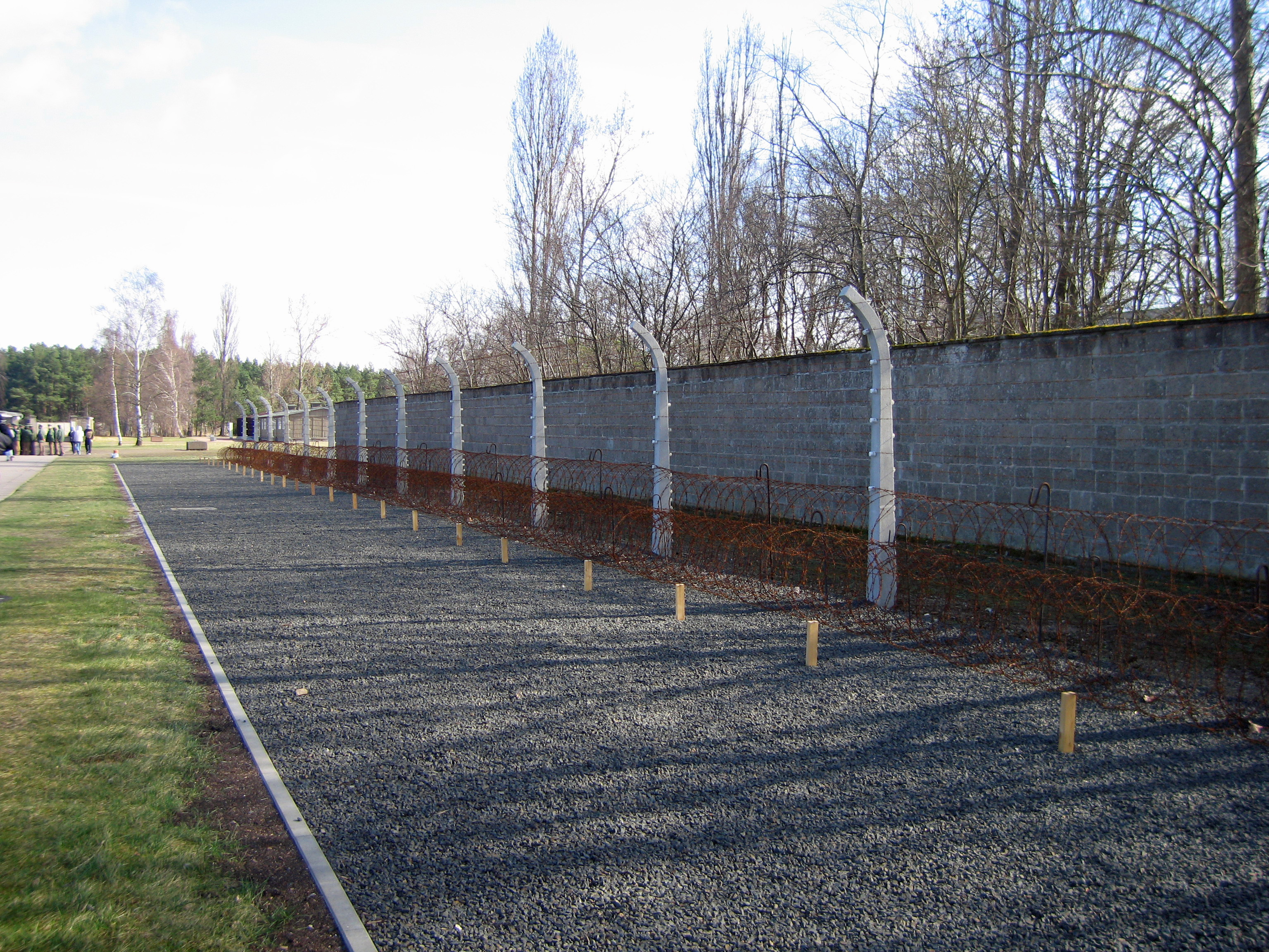 Sachsenhausen_6